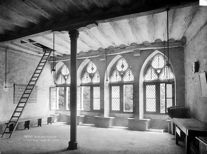 Grande salle du premier étage